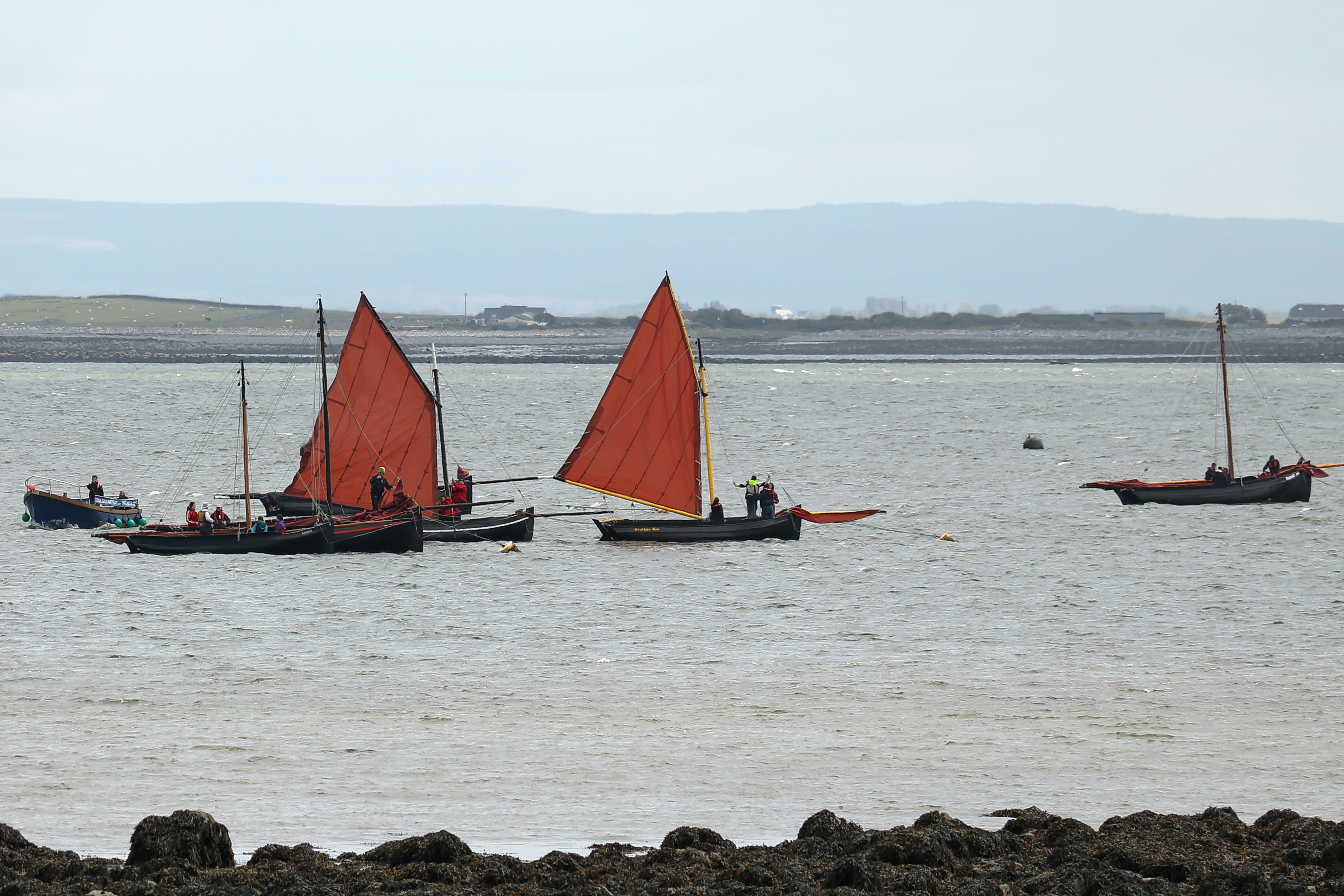 Galway Bay, Galway, Co. Galway, Ireland